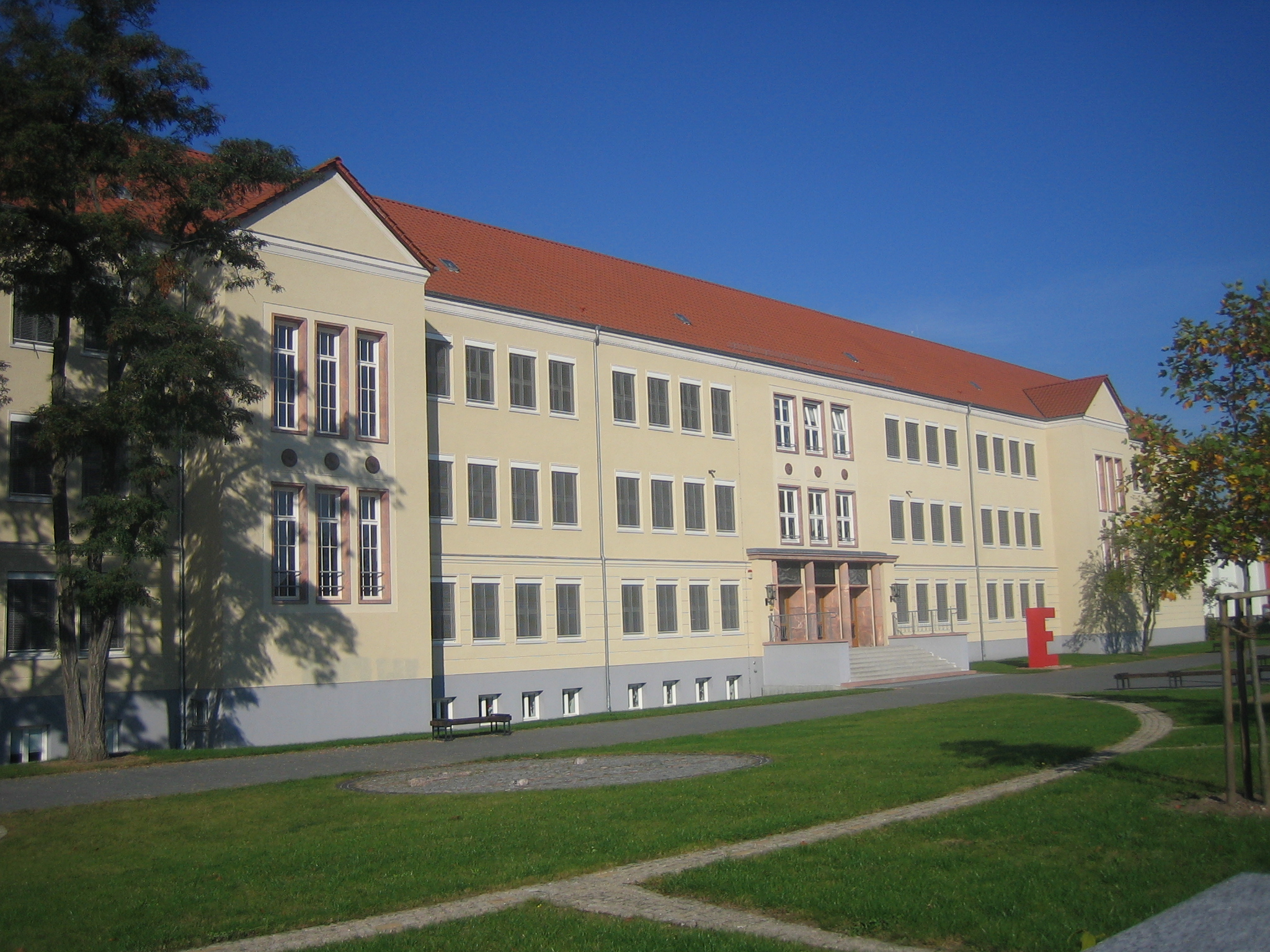 Albert-Einstein-Gymnasium in Neubrandenburg, Landkreis Mecklenburgische Seenplatte